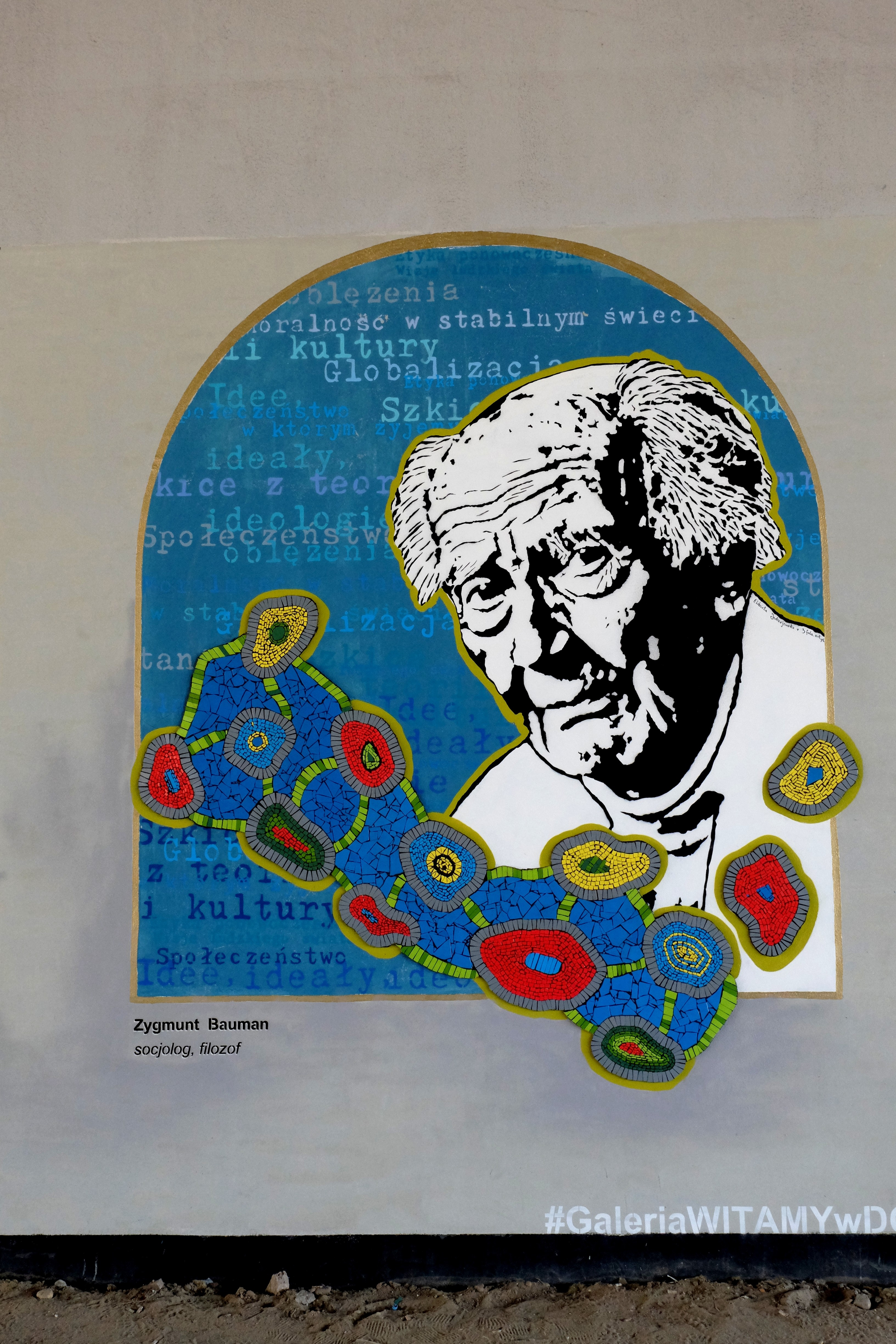 Mural upamiętniający filozofa i socjologa Zygmunta Bumana w Warszawie przy Dworcu Gdańskim zrealizowany przez Fundację Klamra w ramach galerii – Witamy w domu.